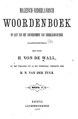 Maleisch-Nederlandsch woordenboek oleh Hermann Theodor Friedrich Karl Emil Wilhelm August Casimir von de Wall